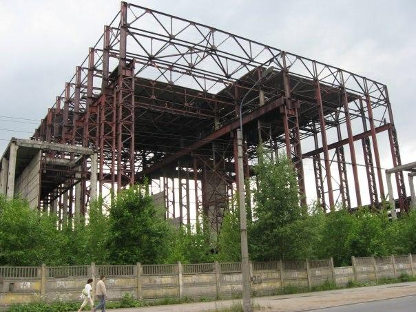 Недостроенный цех ЛОМО. Изначально был загружен, как несвободное изображение на Русскую Википедию, но автор файла дал разрешение на его свободную публикацию и после этого его было рекомендовано перенести на Викисклад, что и было сделано